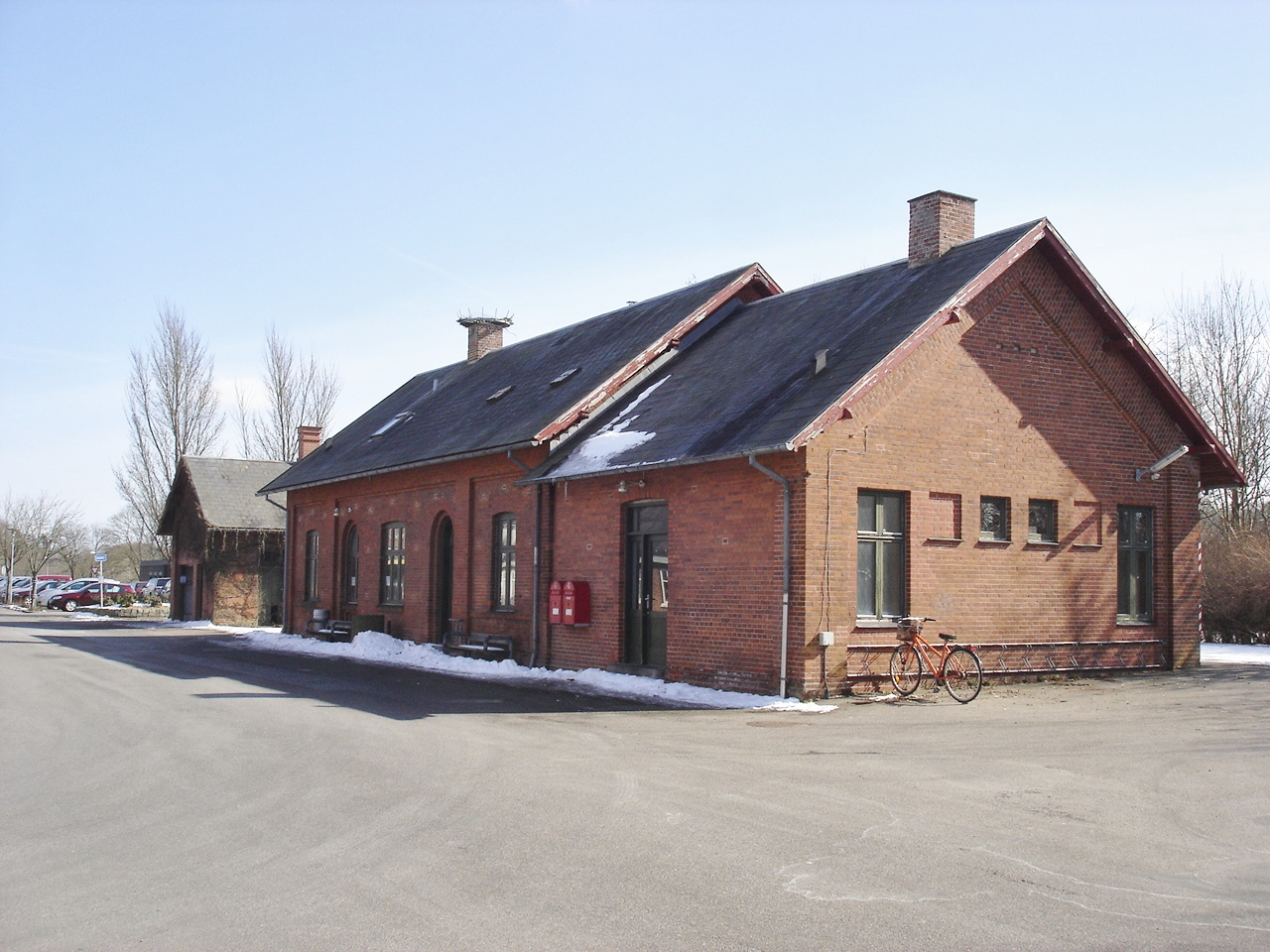 Nørager Station, vejsiden fra V